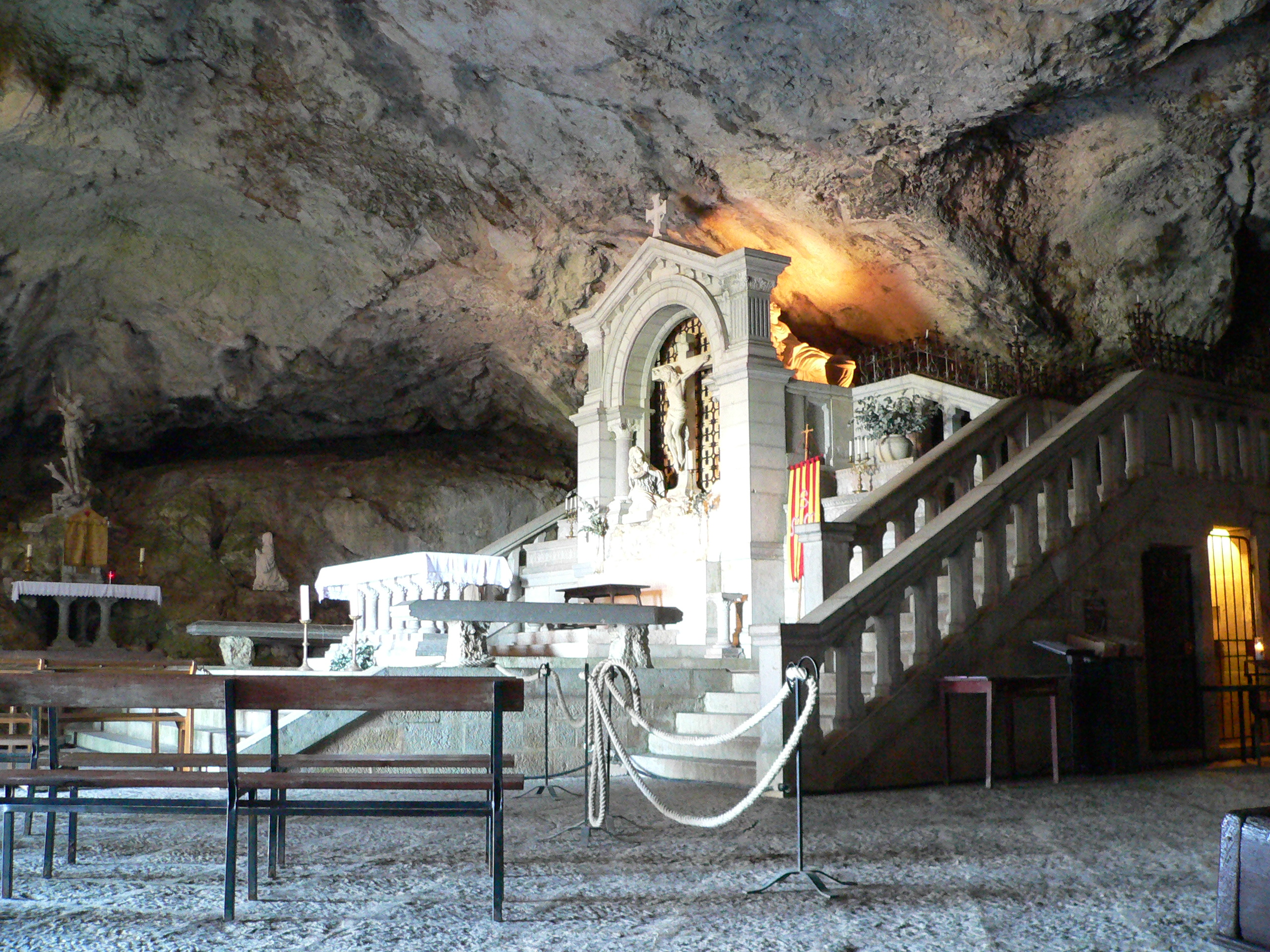 M. Disdero Juillet 2006 Grotte Sainte Baume